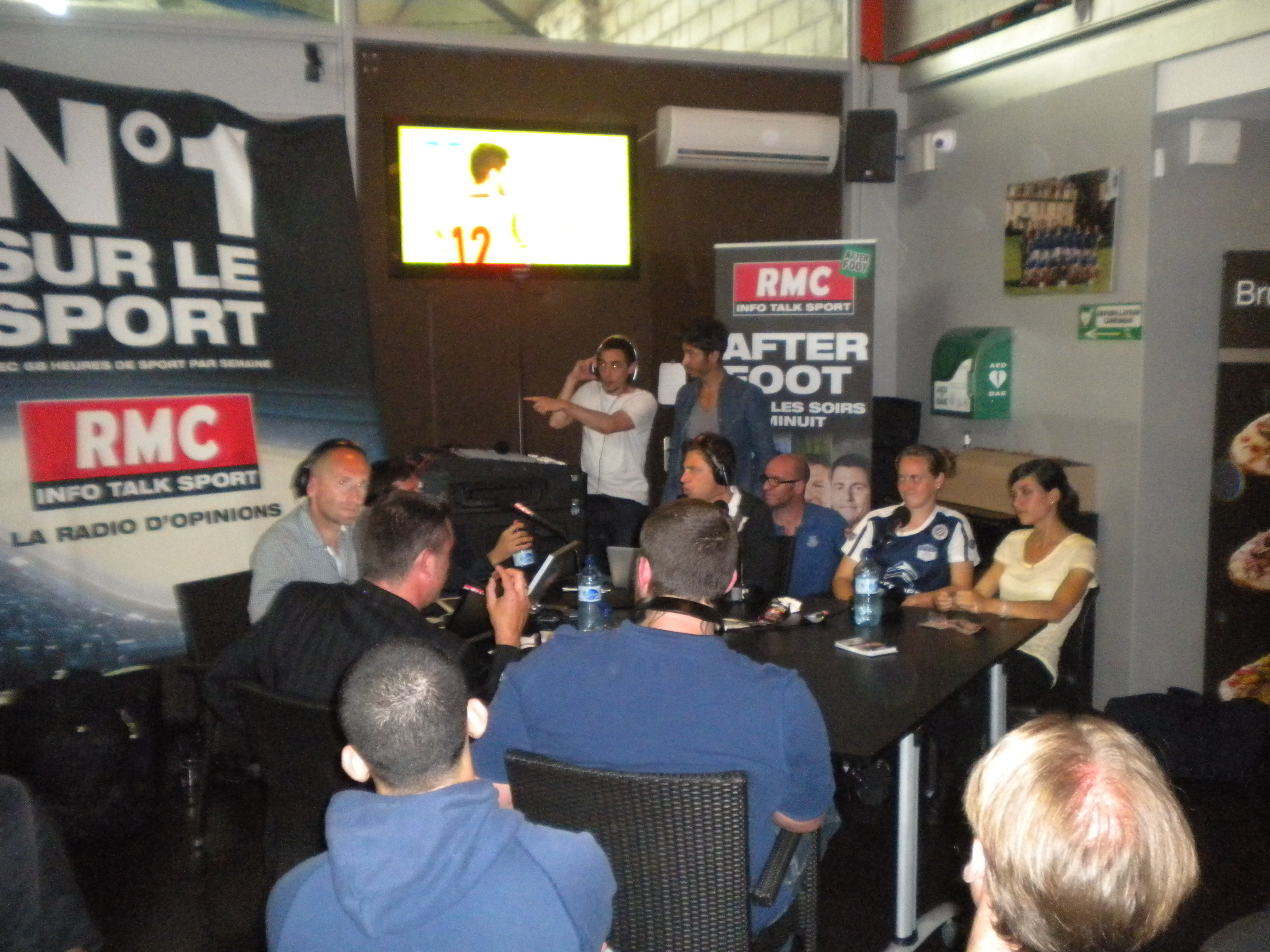 L'émission l'after foot sur RMC le 20/06/13 à Toulouse.